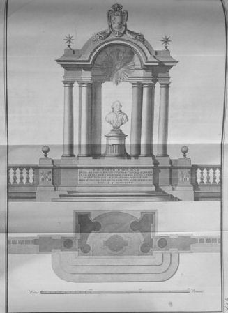 disegno del progetto di sistemazione del busto bronzeo di Pio VI sulla pubblica Piazza di Treia redatto dall'Arch. Andrea Vici